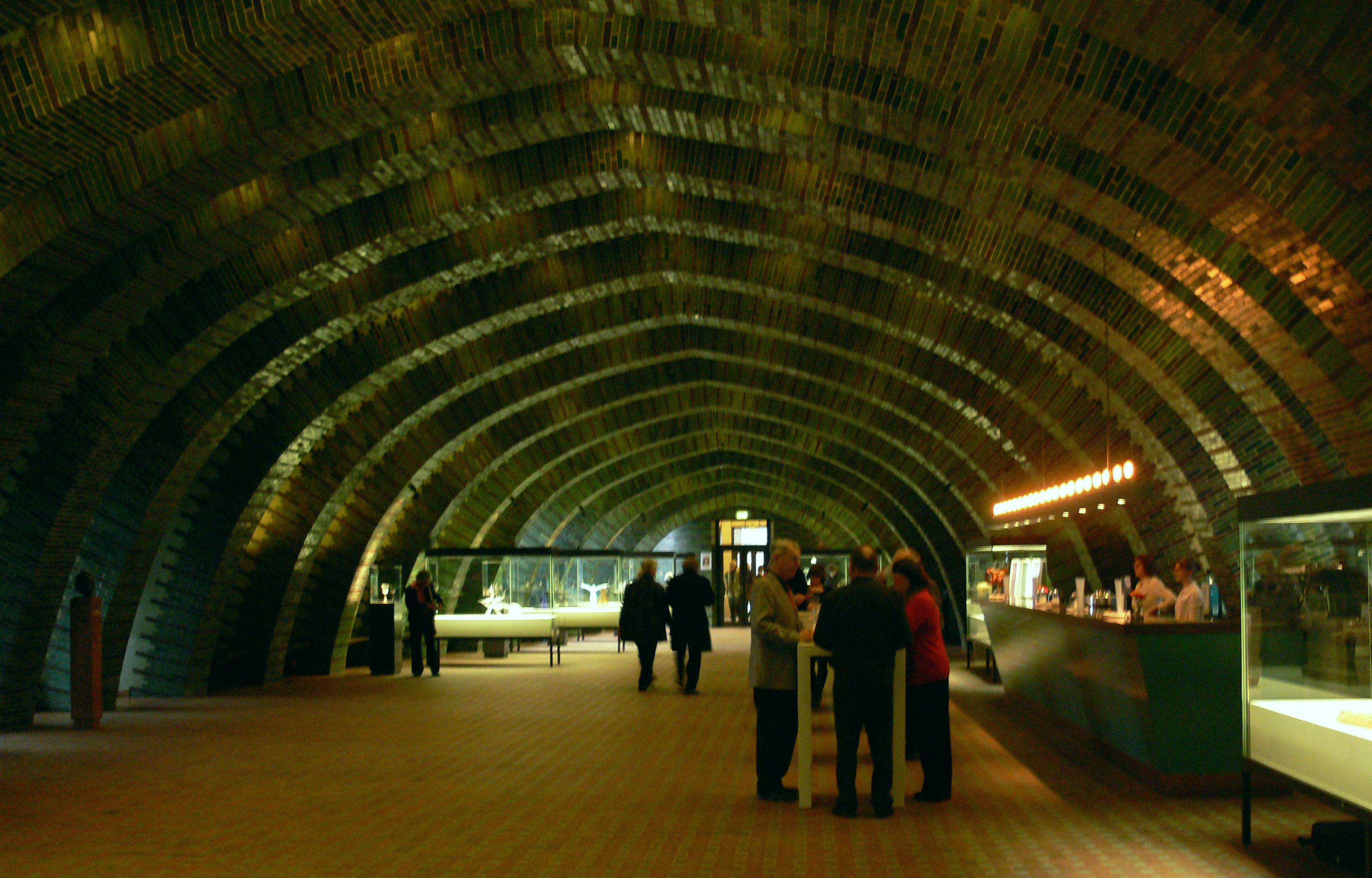 Düsseldorf, Tonhalle Grünes Gewölbe